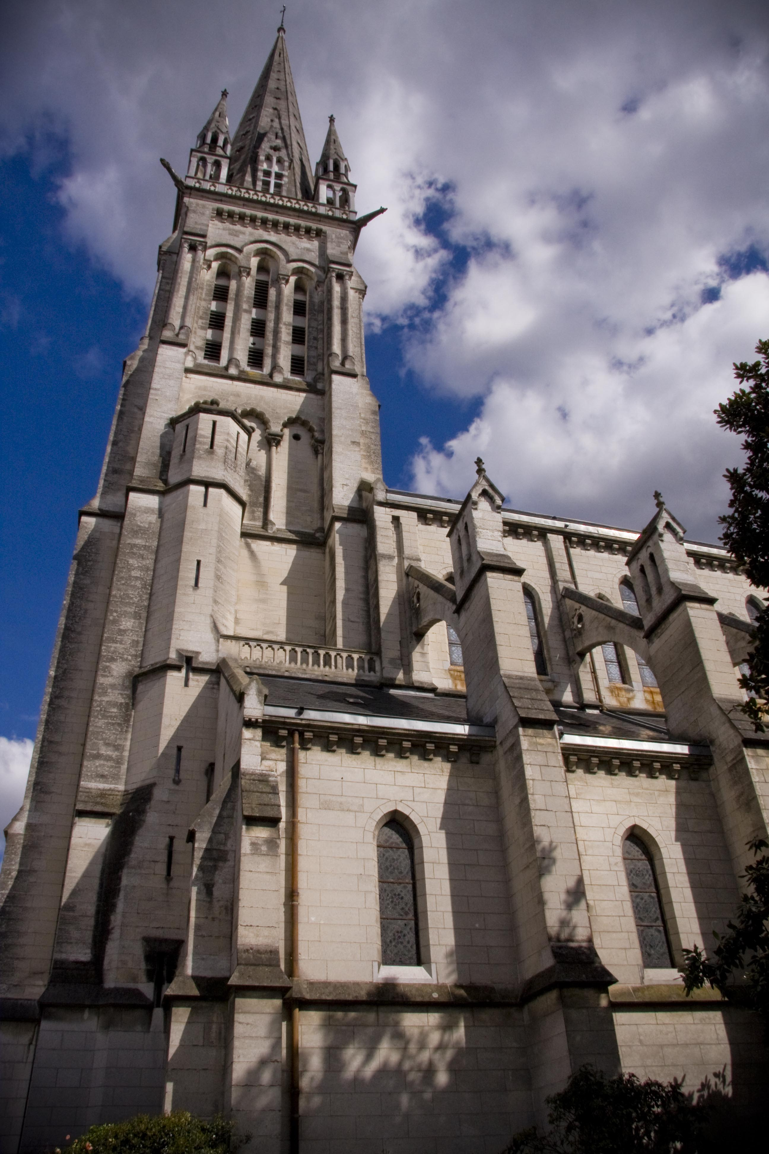 Église Saint-Martin de Pau